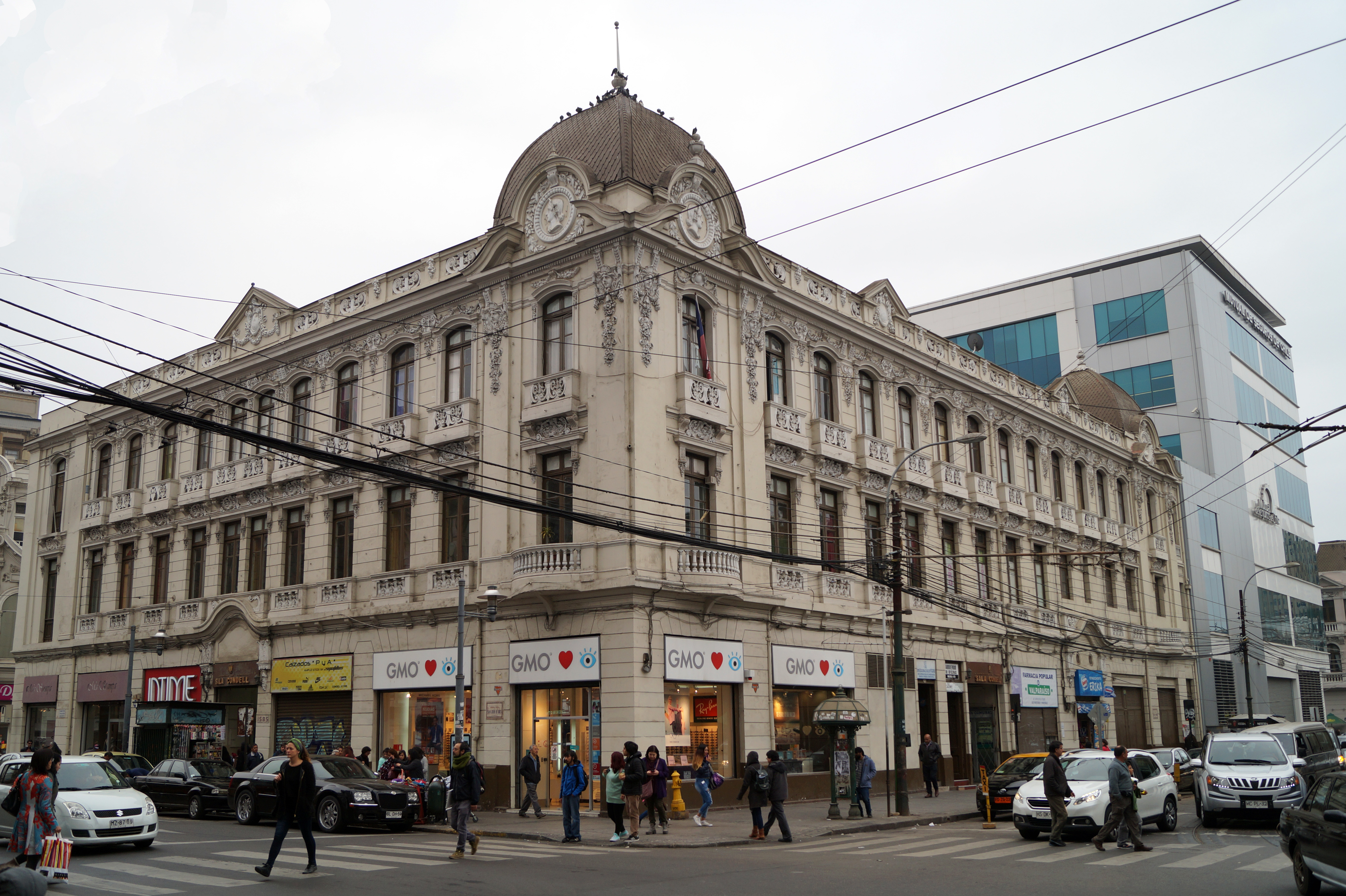 Edificio del Teatro Condell de Valparaíso, Chile, donde está la galería del mismo nombre.